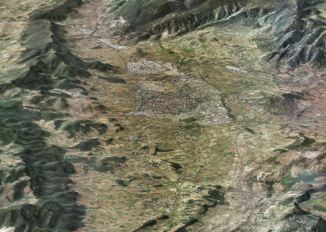 Gasteiz eta Gasteiz mendien airetiko argazkia